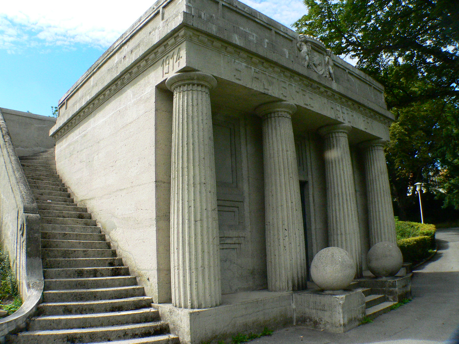 Eingangsbauwerk des Wasser-Erdbehälters Plattenäcker in Coburg, Oberfranken, Deutschland